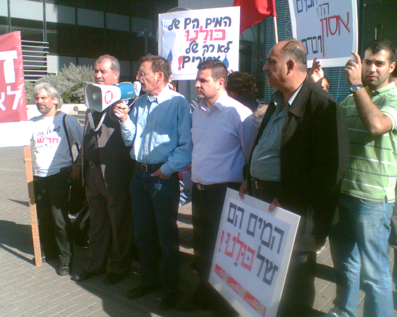 הפגנה בנוכחות מנהיגי חד"ש. עם המגאפון: ח"כ דב חנין. מימינו: יו"ר חד"ש, ח"כ מוחמד ברכה. משמאלו: מזכיר חד"ש איימן עודה רישיון נוצר על ידי משתמש:דוד שי